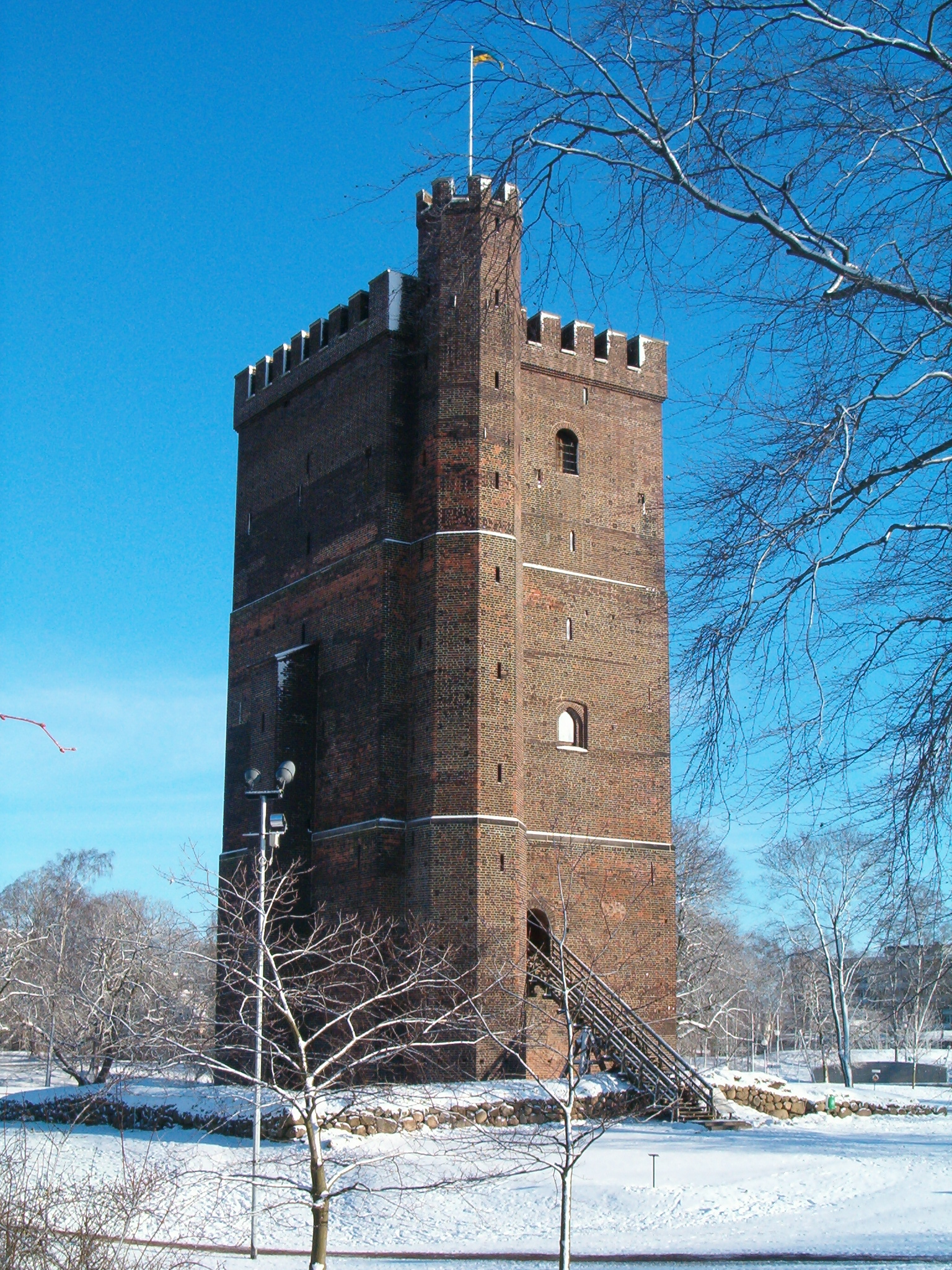 Kärnan i Helsingborg i vinterskrud